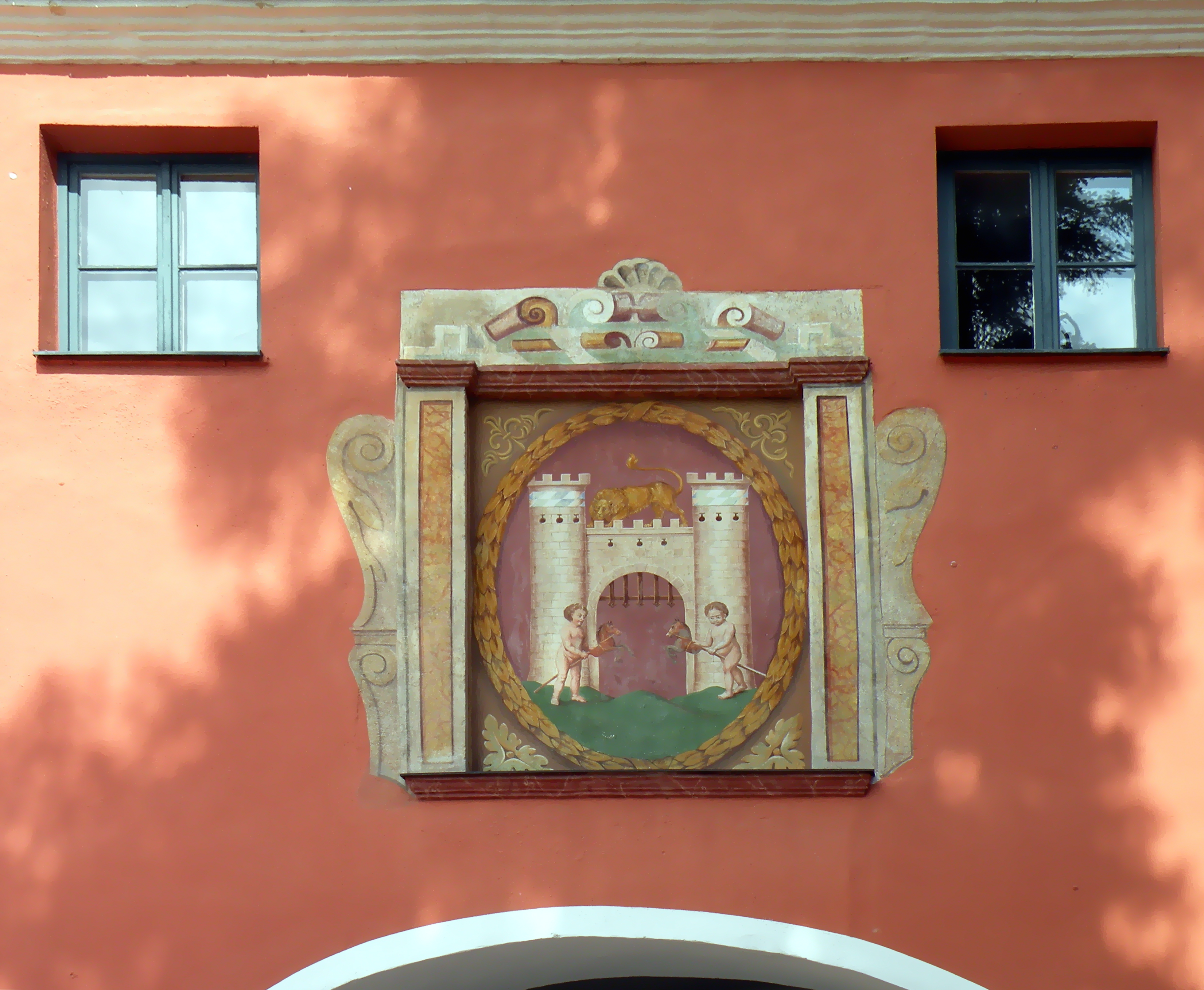 Neuburg_(Donau). Upper gates fragmen